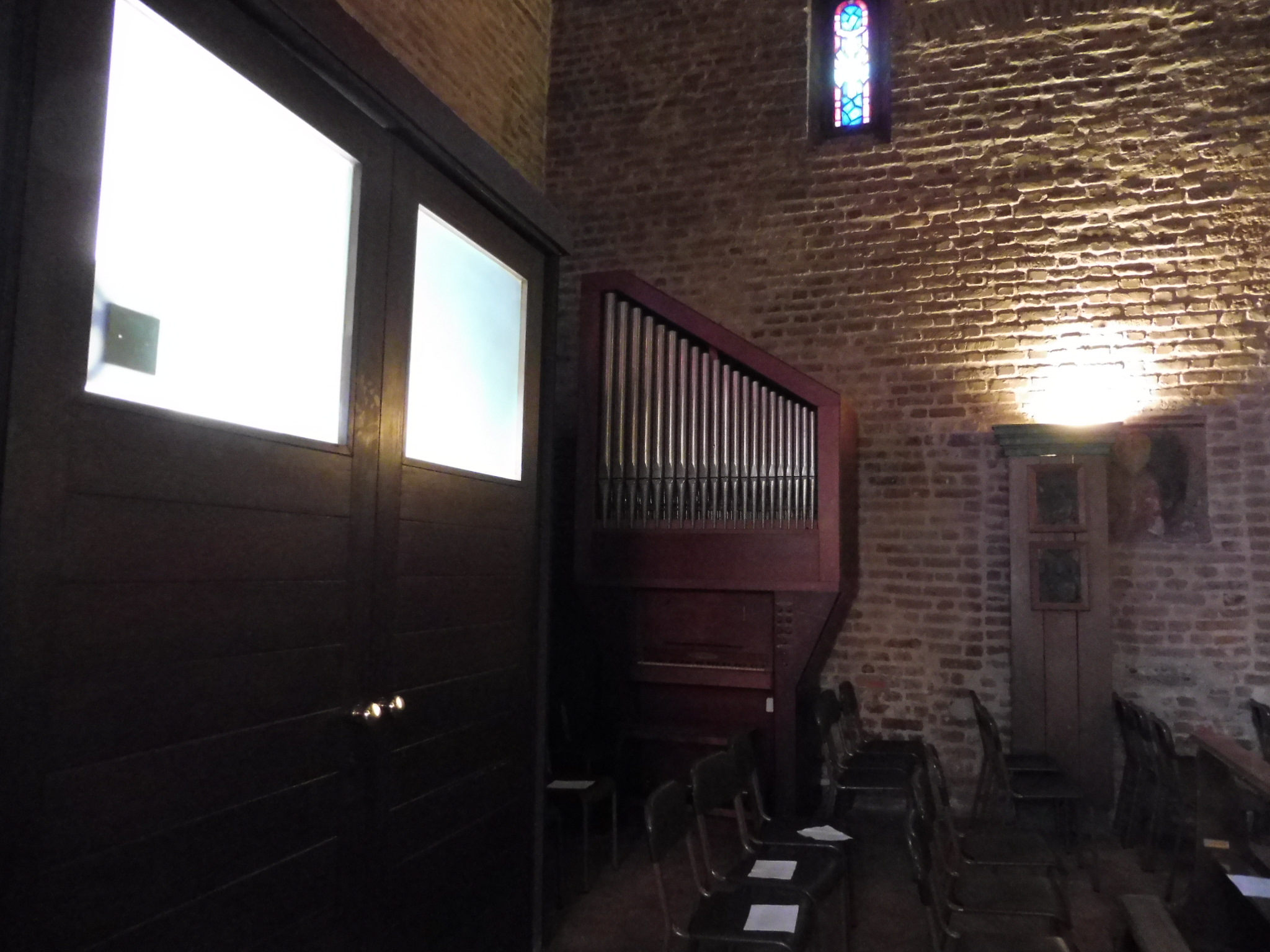 Milano, San Cristoforo sul Naviglio, organo